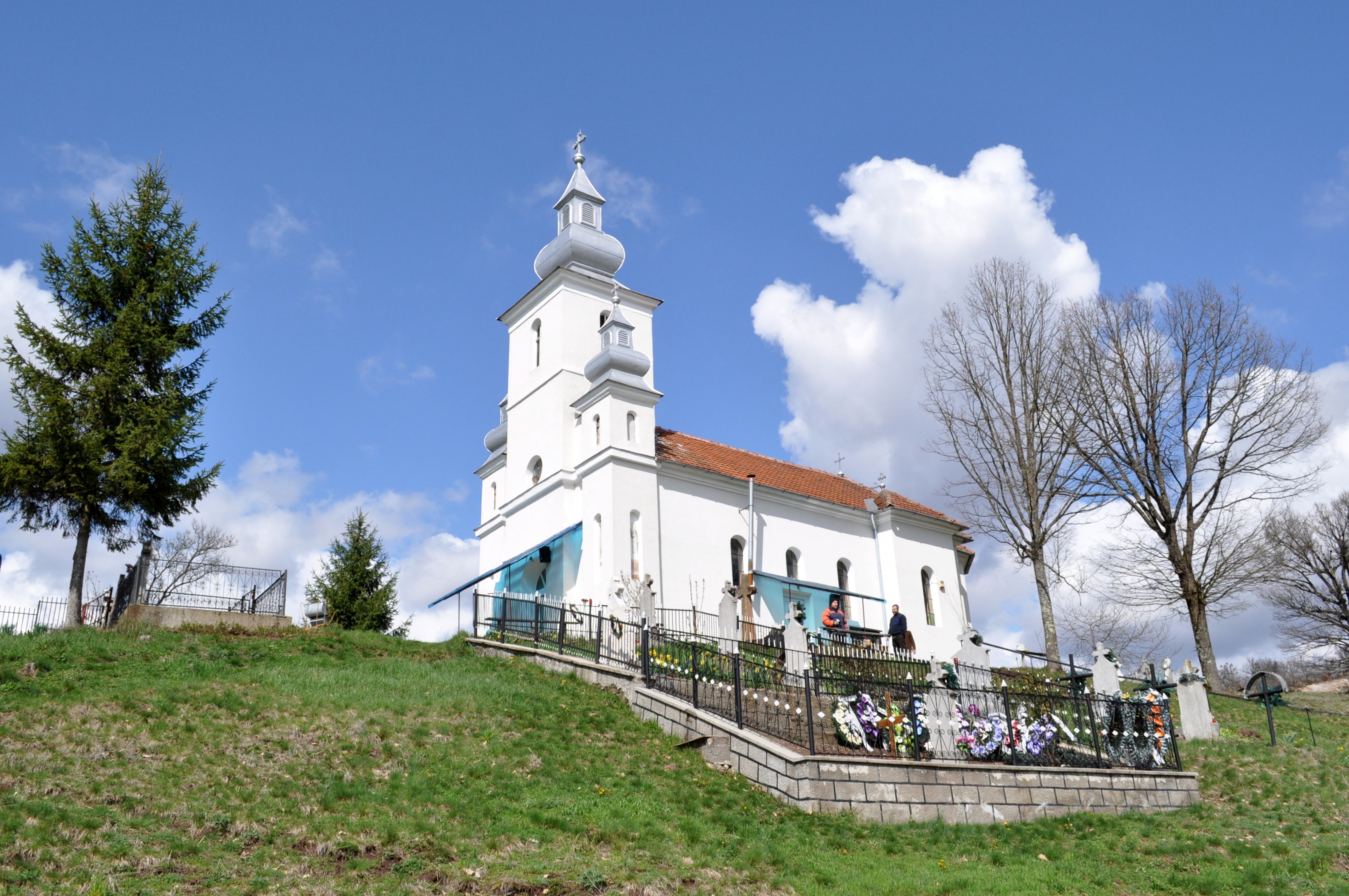 Biserica „Sfântul Ierarh Nicolae”, sat OBÂRŞA; comuna TOMEŞTI